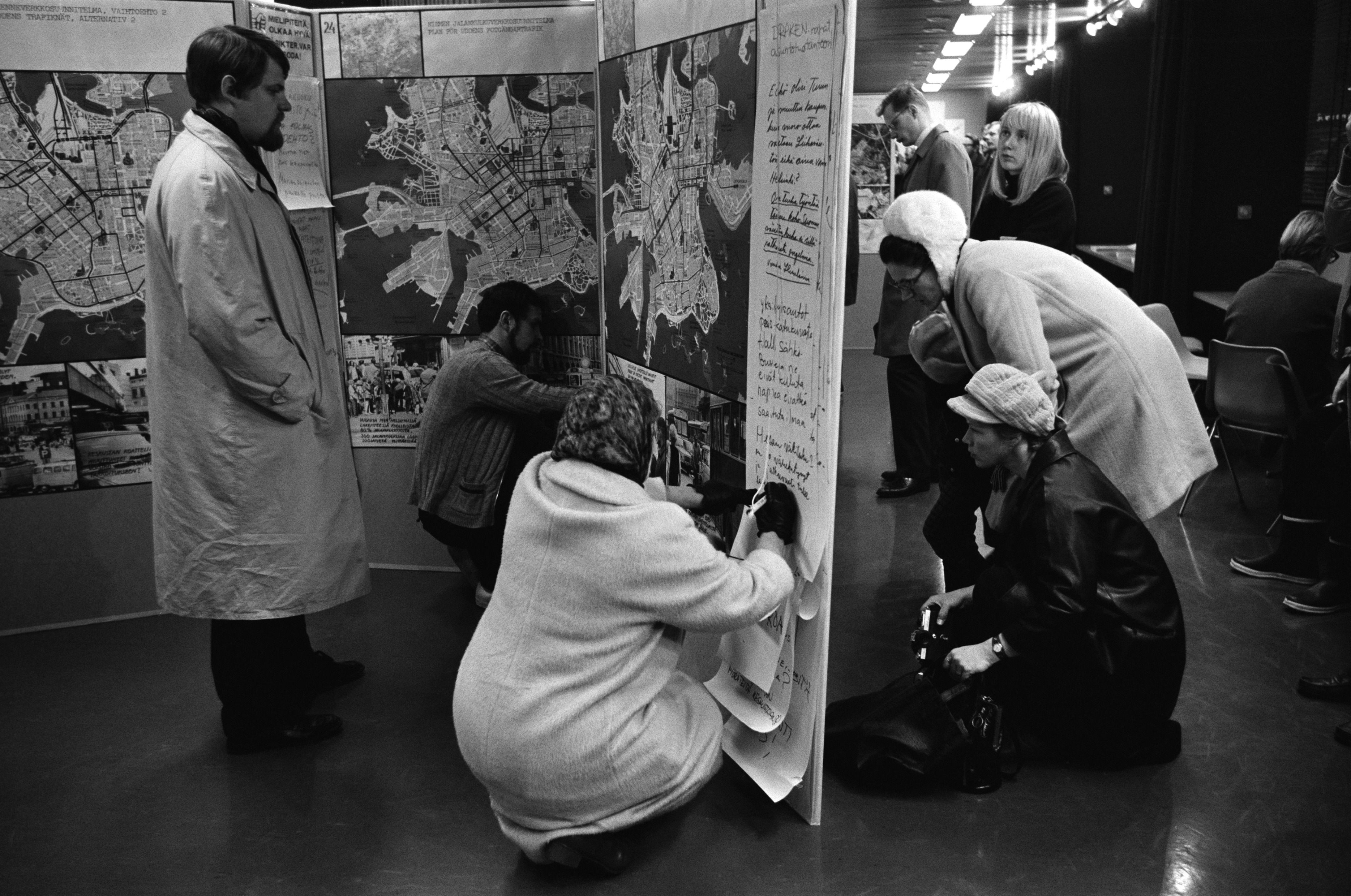 Helsingin Yleiskaava 1970 -näyttely. Pohjoinen Makasiinikatu 9.